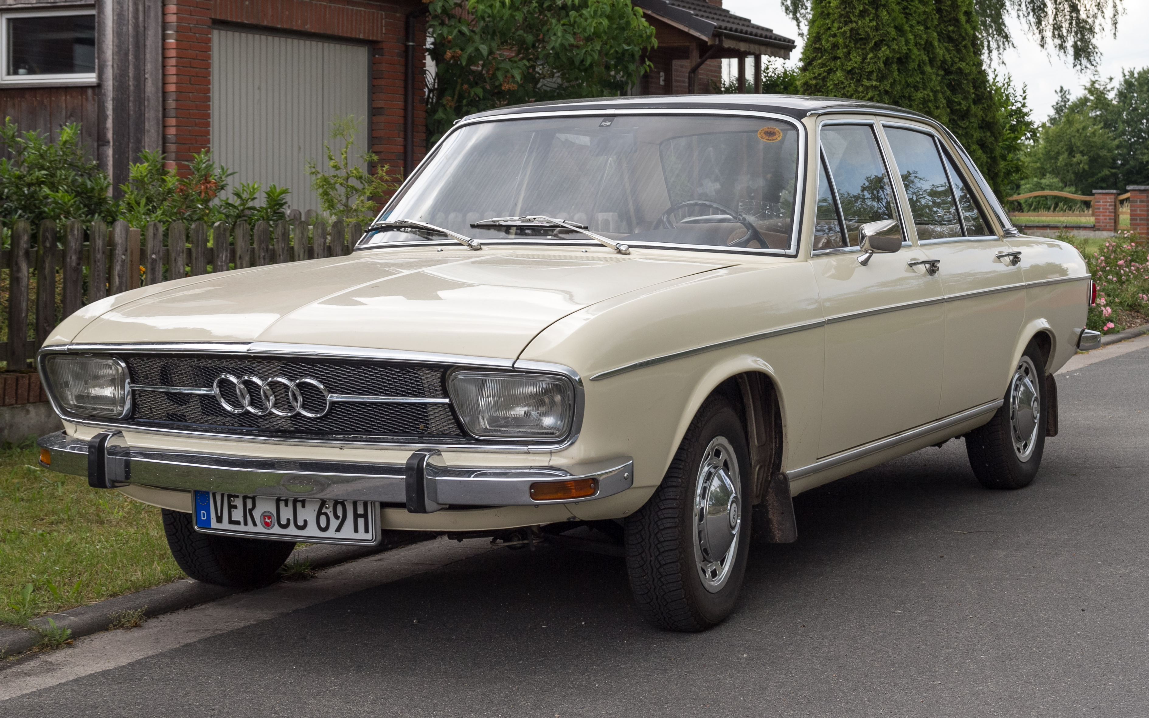 Audi 100 C1 4-Türer